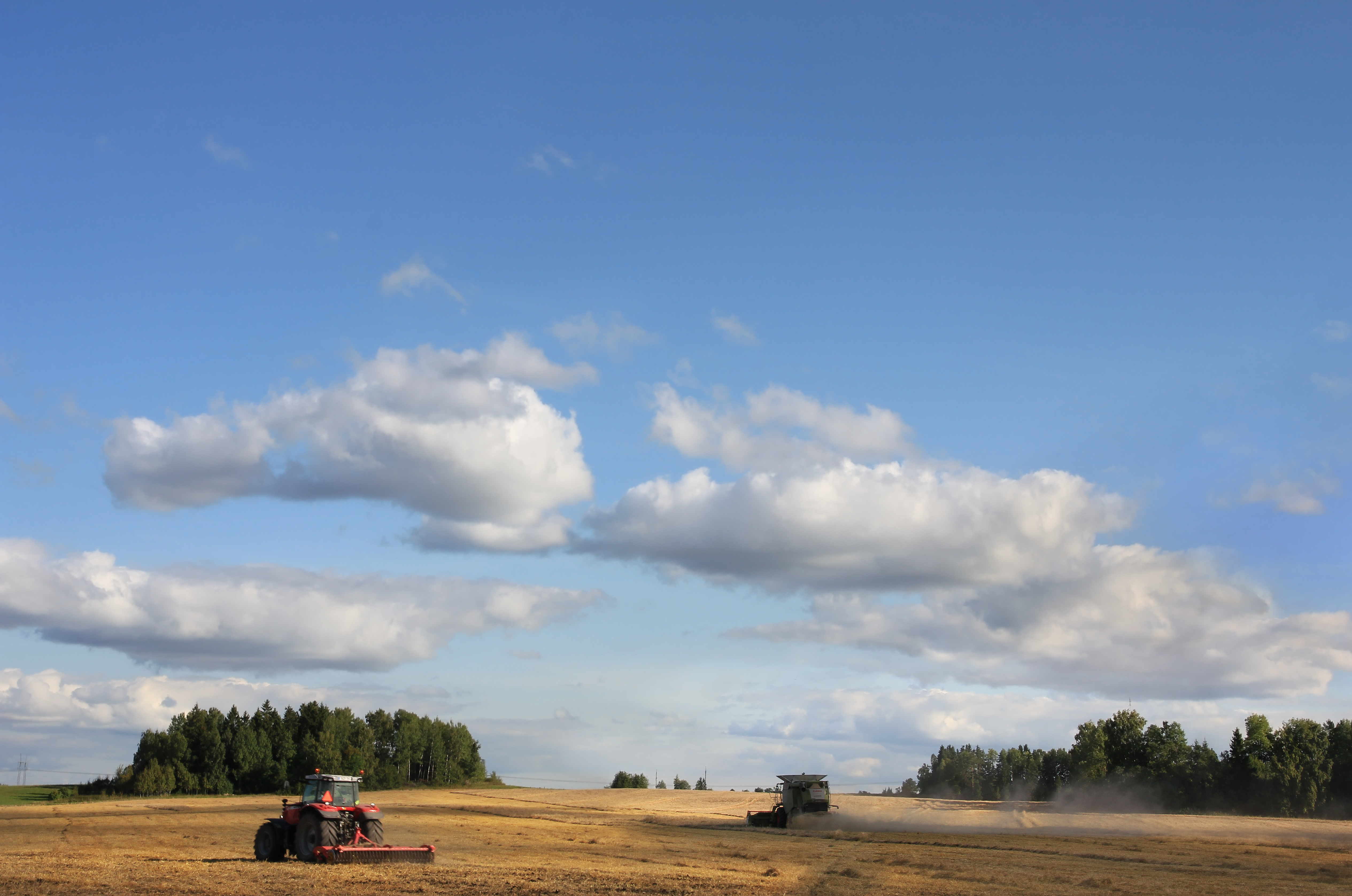 Tõhus agrotenika.Viljalõikuse järel kõrrekoorimine